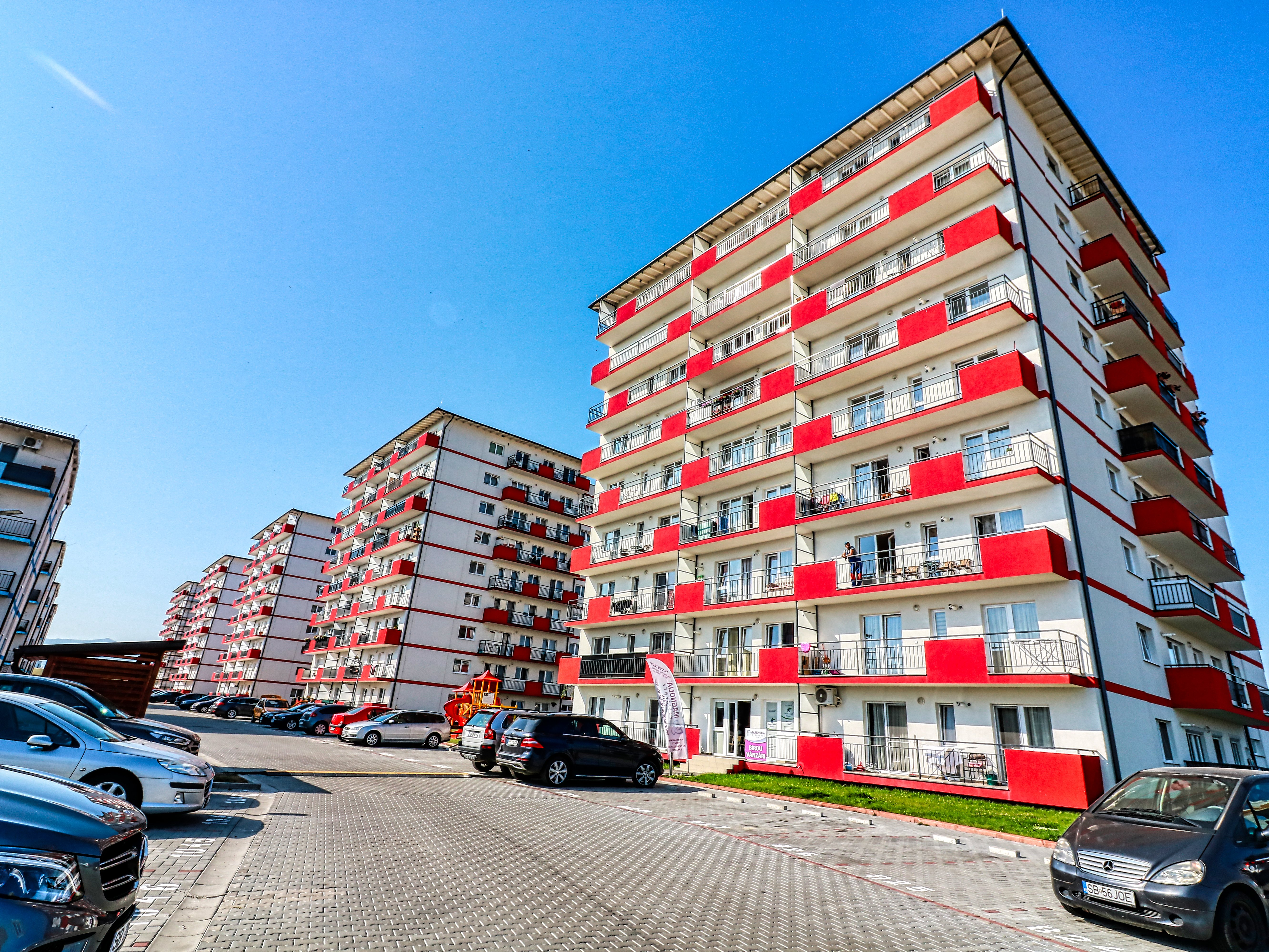 Poză exterioară